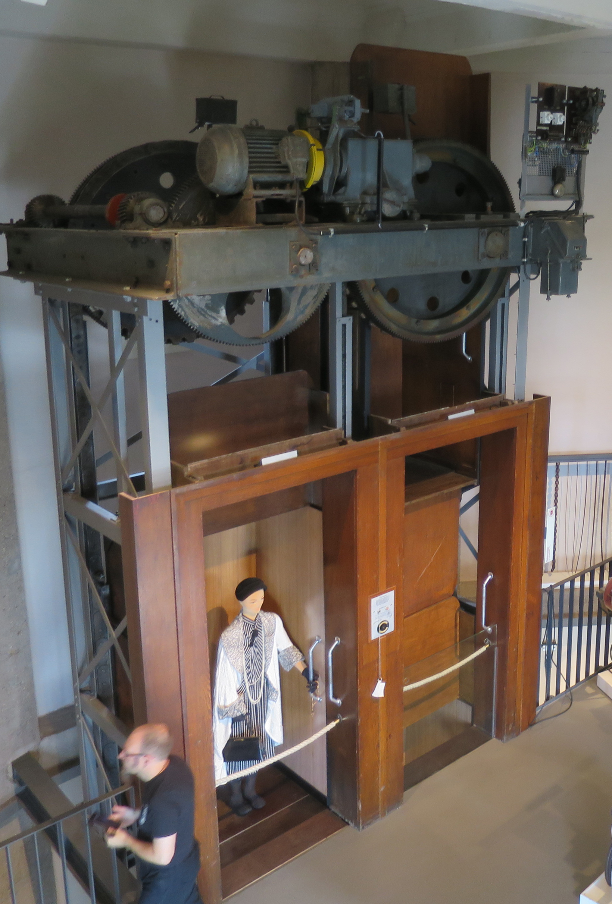 Aufzugmuseum Mannheim-Seckenheim: Paternosteraufzug